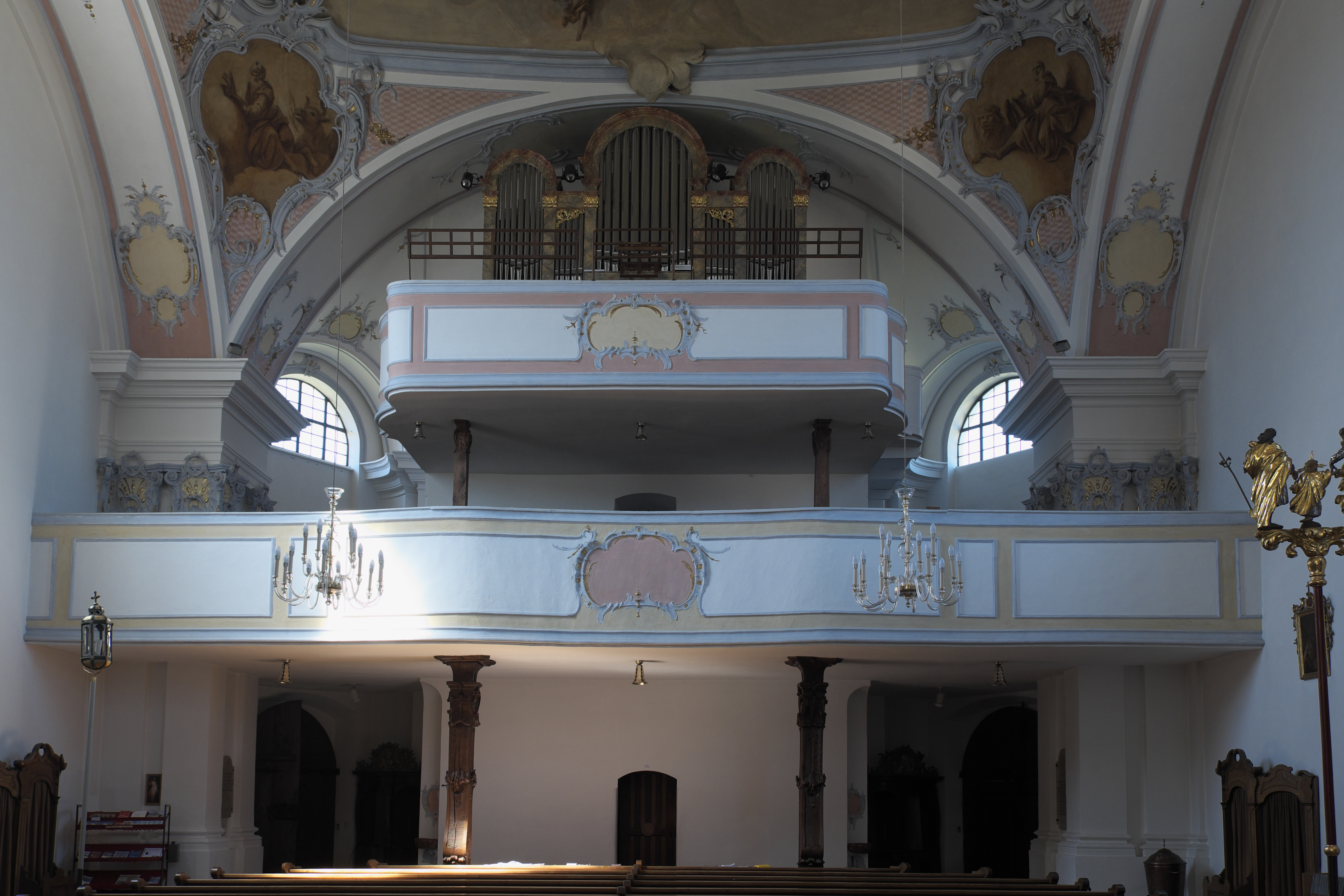 Katholische Pfarrkirche St. Johannes Baptist in Inning am Ammersee im Landkreis Starnberg (Bayern/Deutschland), Doppelempore im Westen